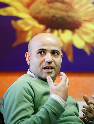 سعید چنگیزیان در نشست بررسی نمایش تن تن و راز قصر مونداس